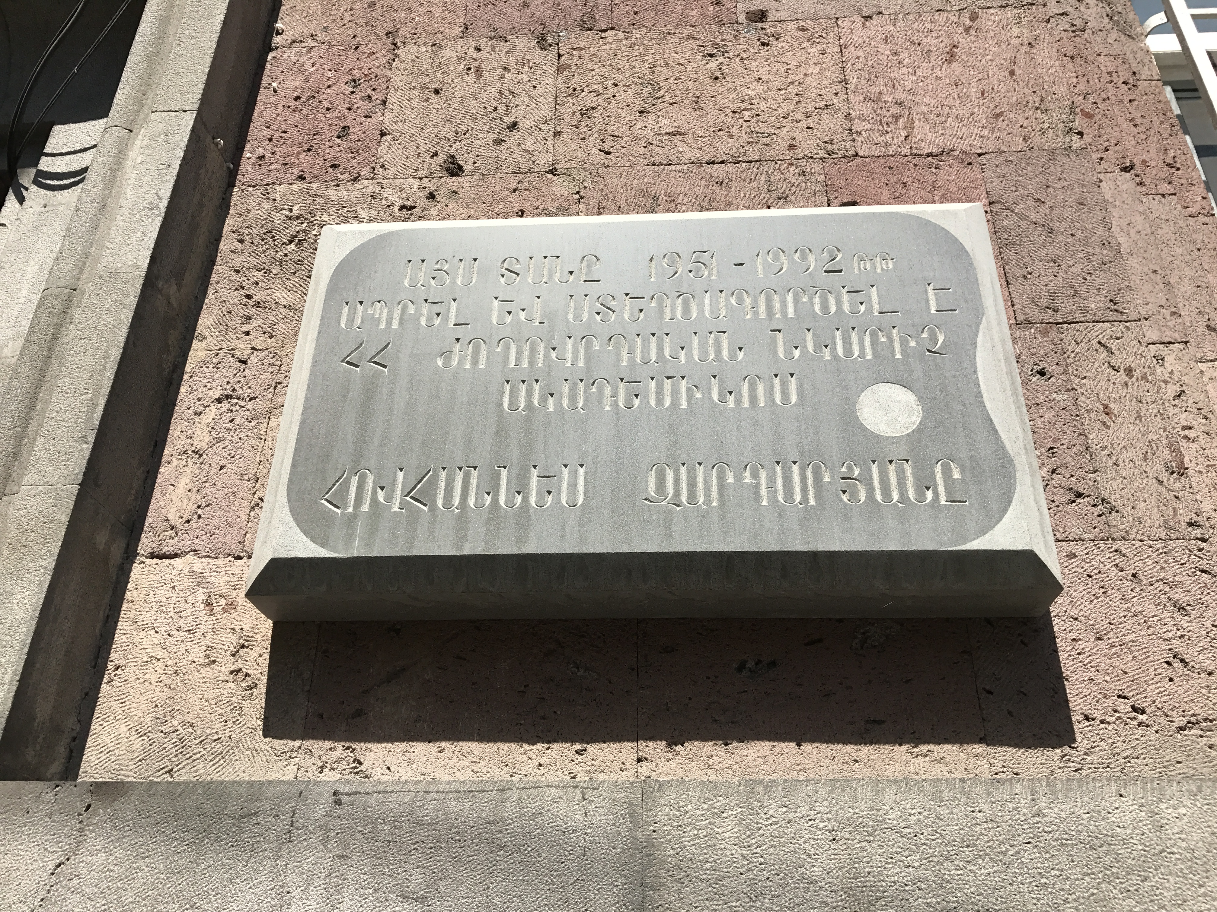 Image d'Erevan en juillet 2017. Sujet divers..